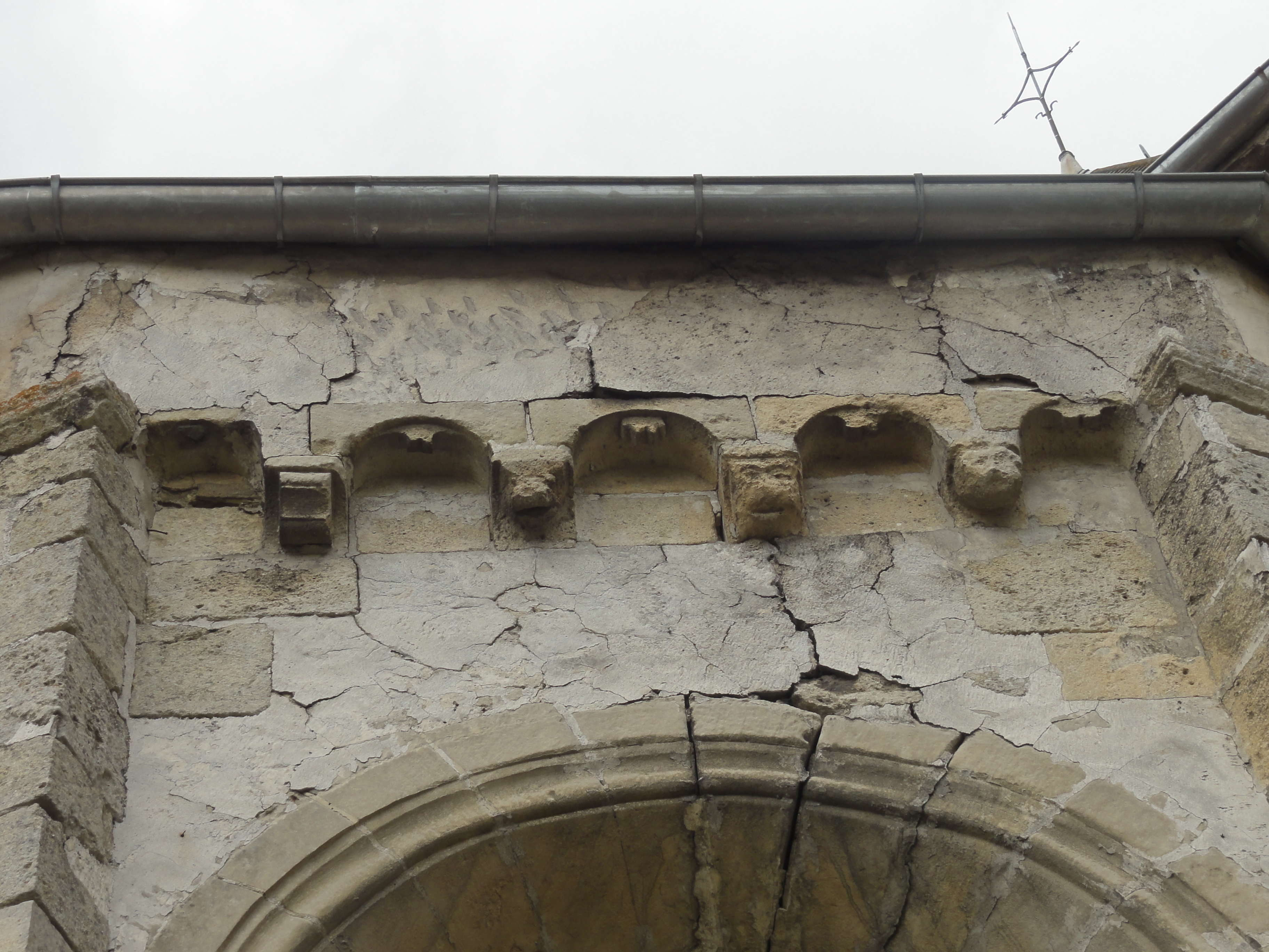 Voir titre.